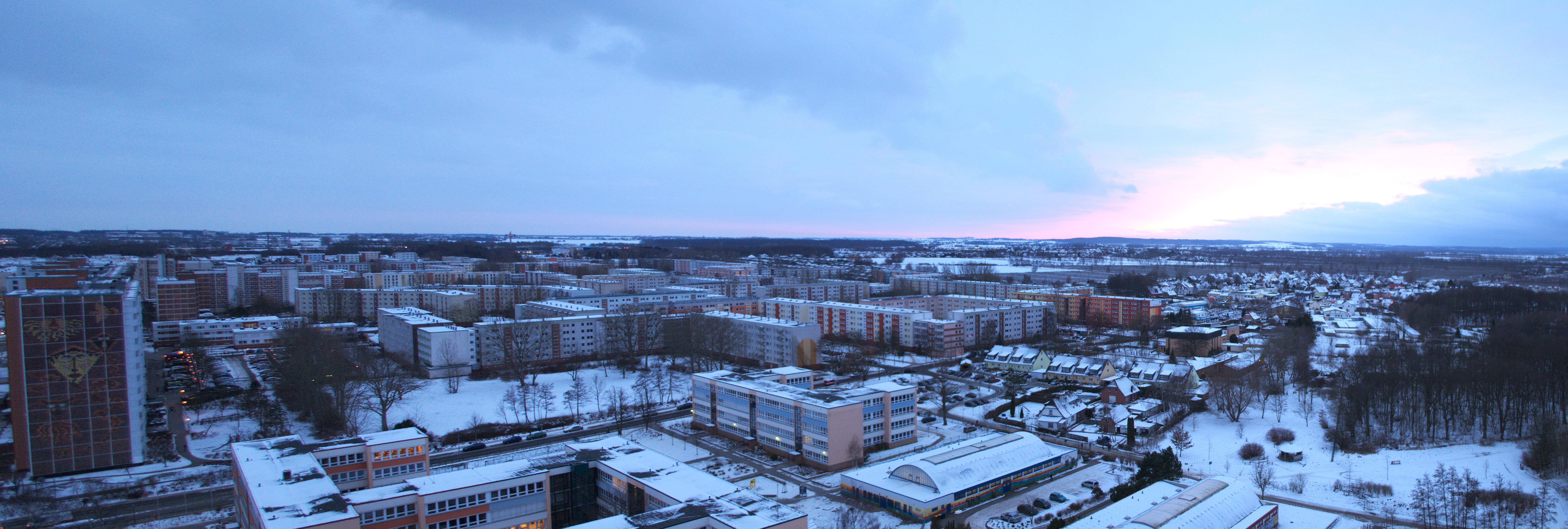 Panorama des Rostocker Stadtteils Evershagen.